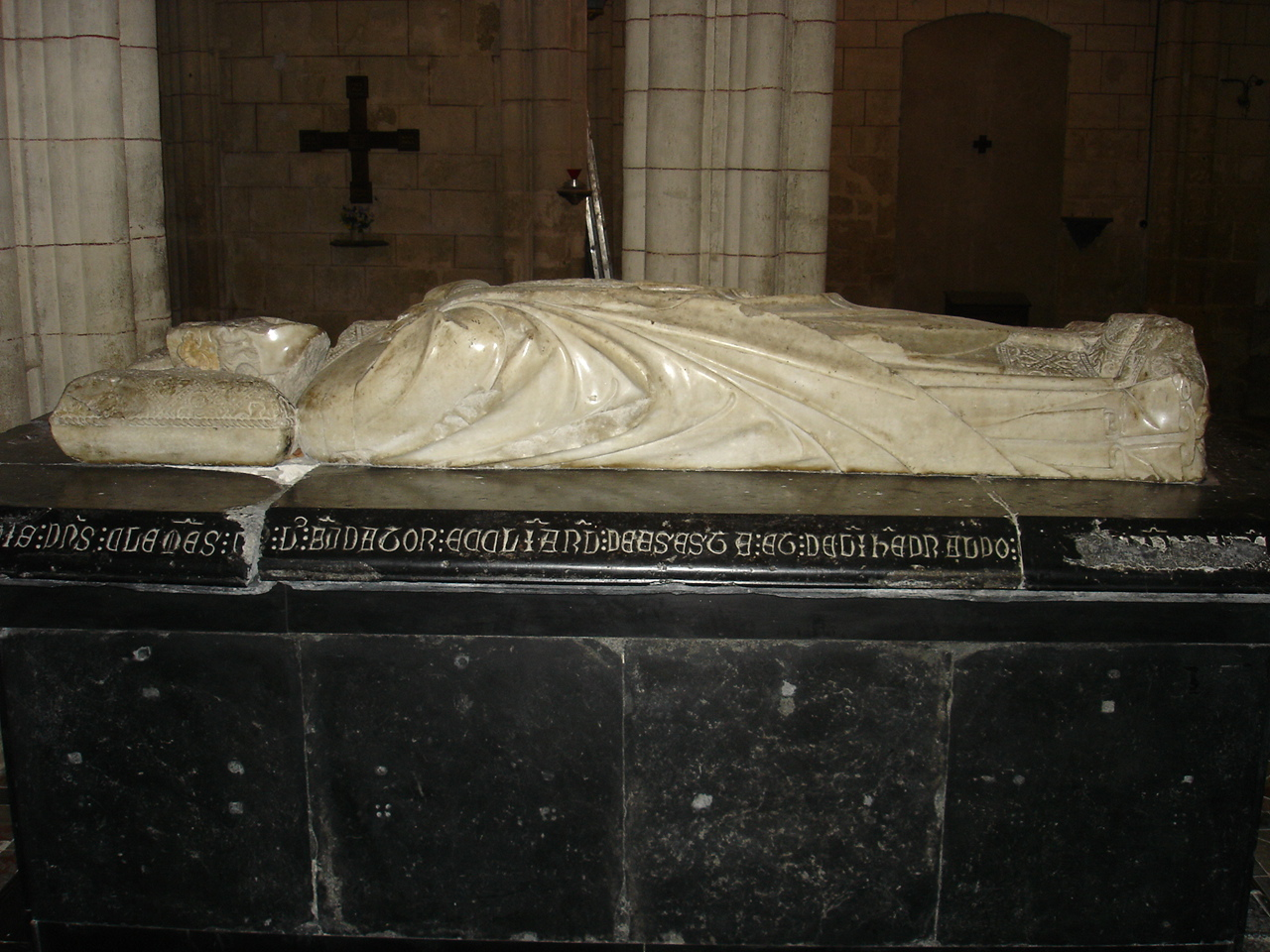 gisant de Clément V à Uzeste (33 Gironde France)